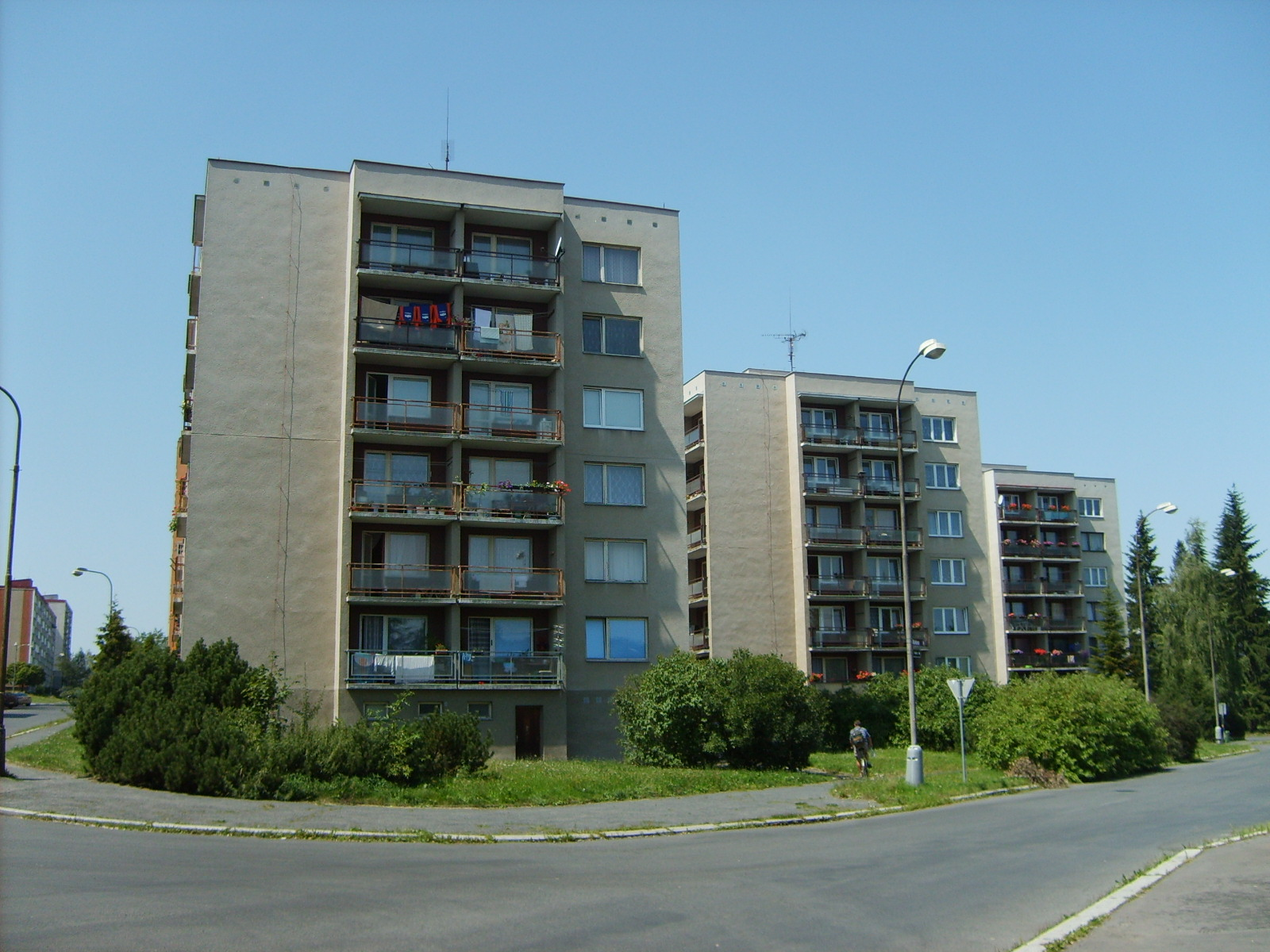 Paneláks in Hlávkova street, Klatovy